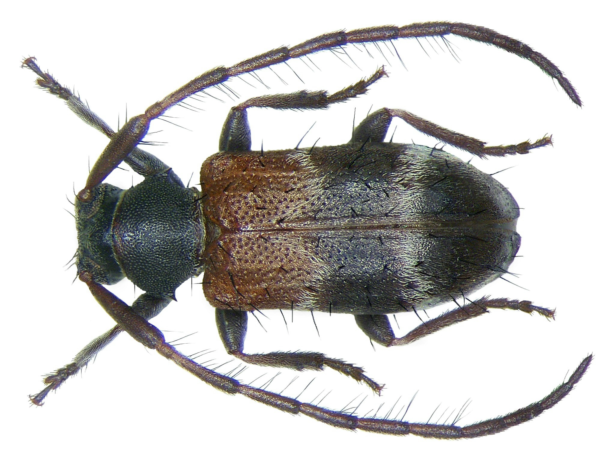 Familie: Cerambycidae Grösse: 4,3 mm Fundort: Laos, Ban Song Cha leg. det. C.Holzschuh, 1999 Foto: U.Schmidt, 2008